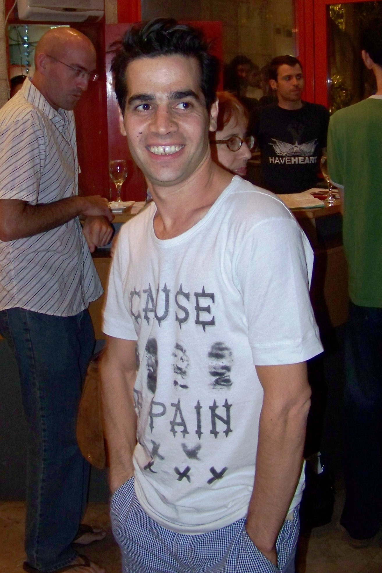 הקרנת הסרט "9.99$" של תתיה רוזנטל לפי סיפורים קצרים של אתגר קרת, סינמטק תל אביב, 16.5.2010. צילום: עידו קינן, חדר 404 (cc-by-sa)